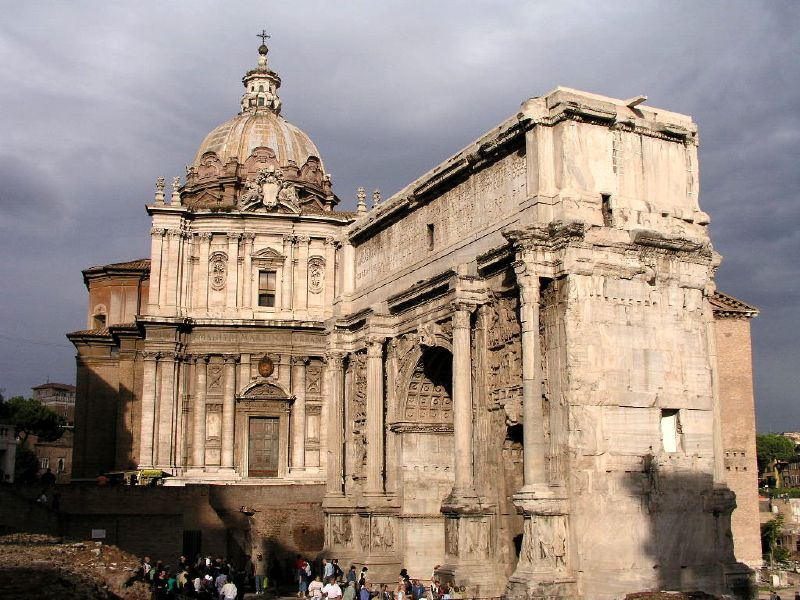 Roma, Italia = Arco di Settimio Severo e Chiesa dei Santi Luca e Martina